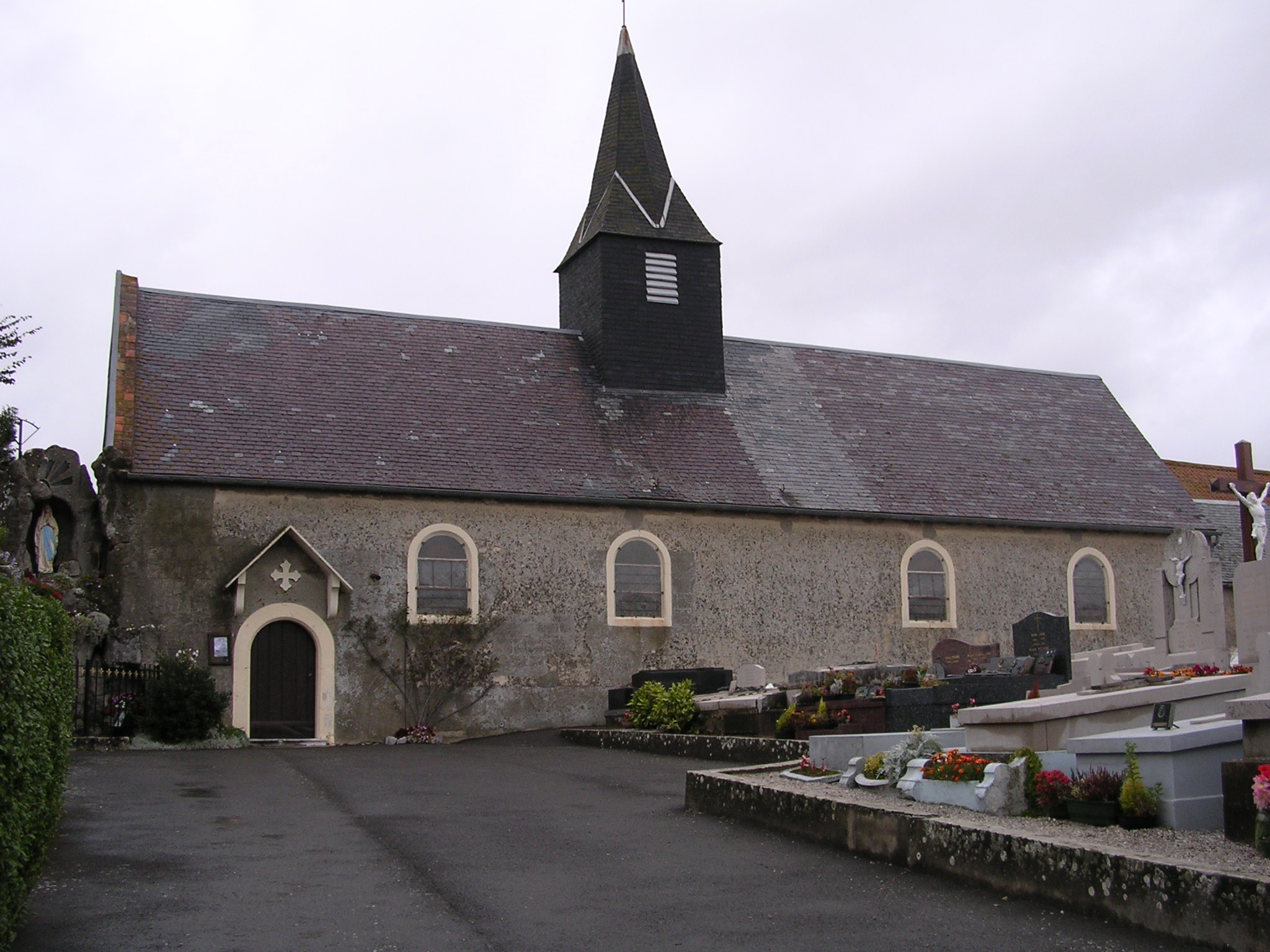 Eglise de Beuvrequen